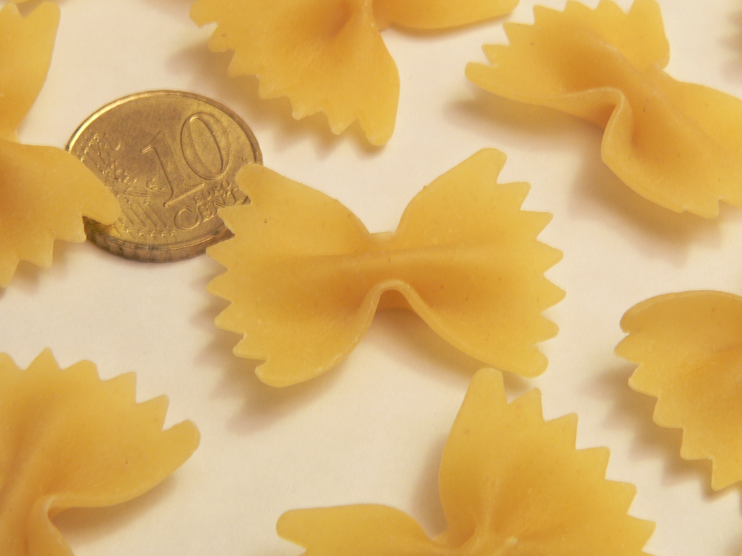 Farfalle